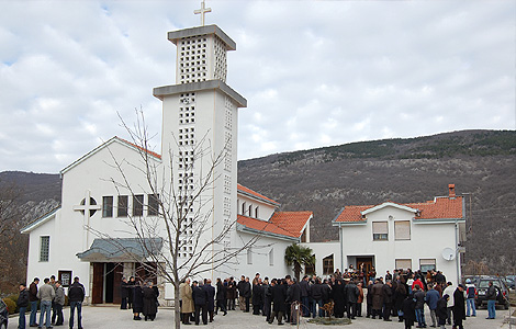 Church in Izbično,Bosnia and Herzegovina on St.Ivan.